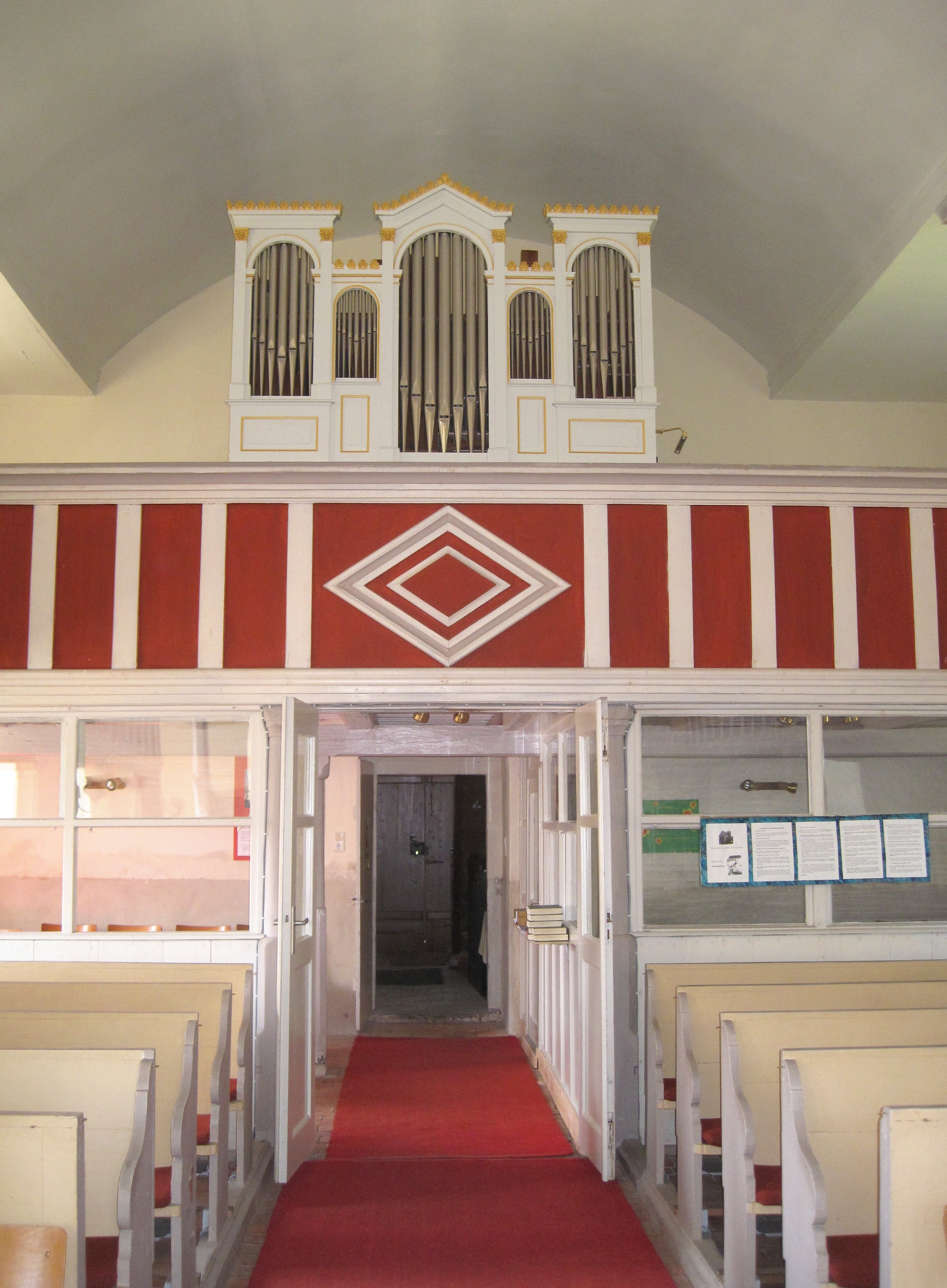 Lütkemüller-Orgel von 1859 in der 1822 nach einem Großbrand wieder aufgebauten evangelischen Dorfkirche in Rathenow, Ortsteil Steckelsdorf, Hauptstraße/Lindenstraße.